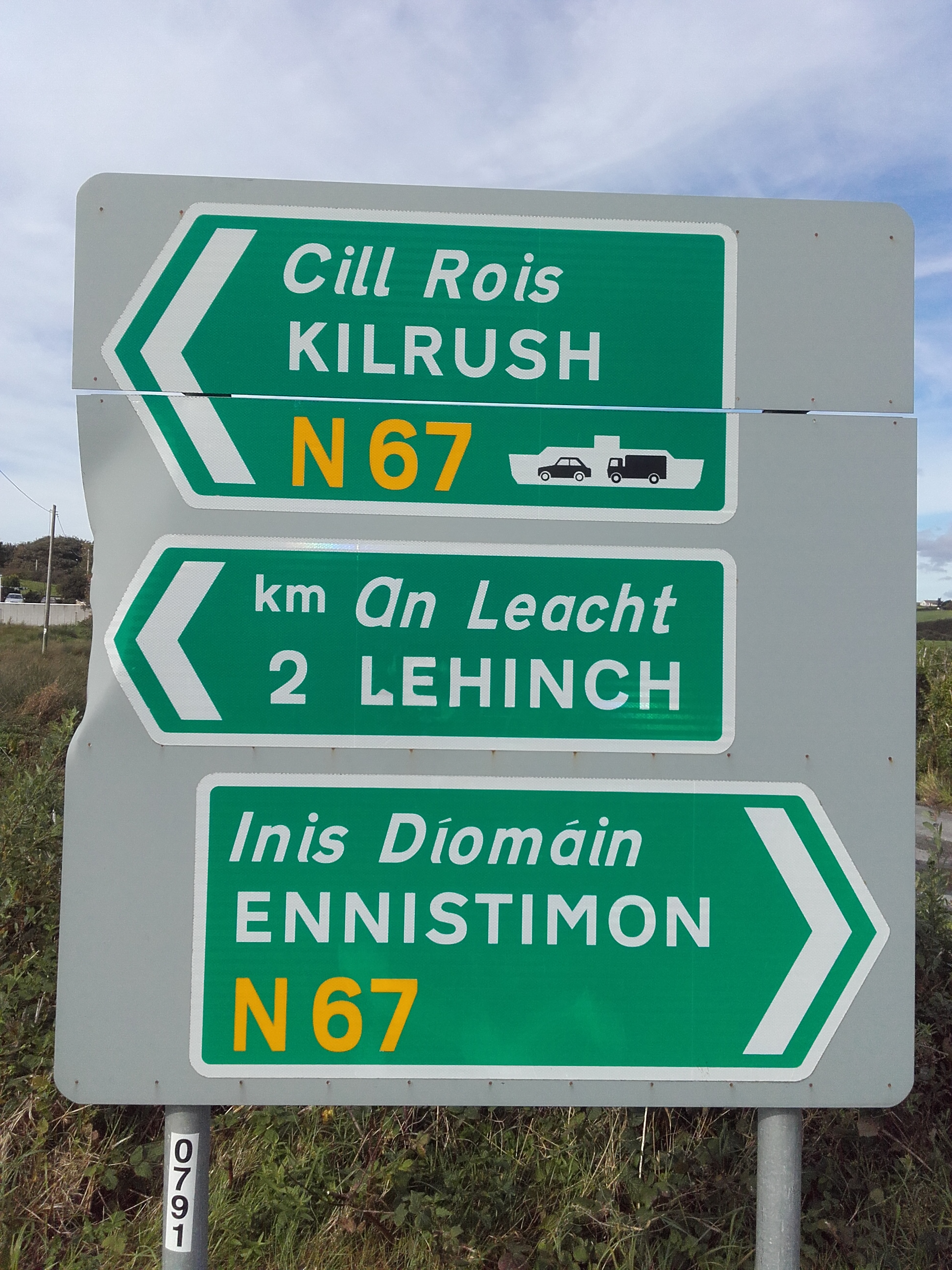 Sinal de tránsito bilingüe preto de Ennistymon.